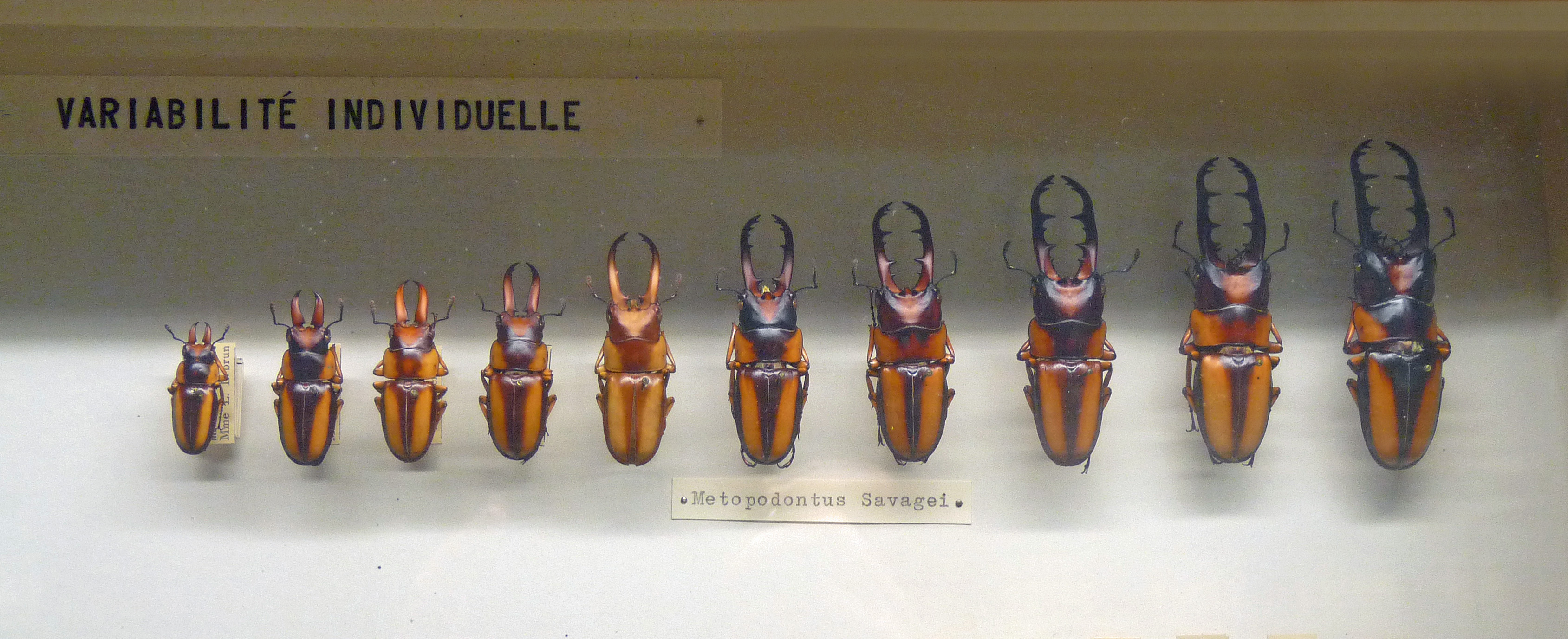 Variabilité individuelle chez Metopodontus savagei. Musée royal de l'Afrique centrale